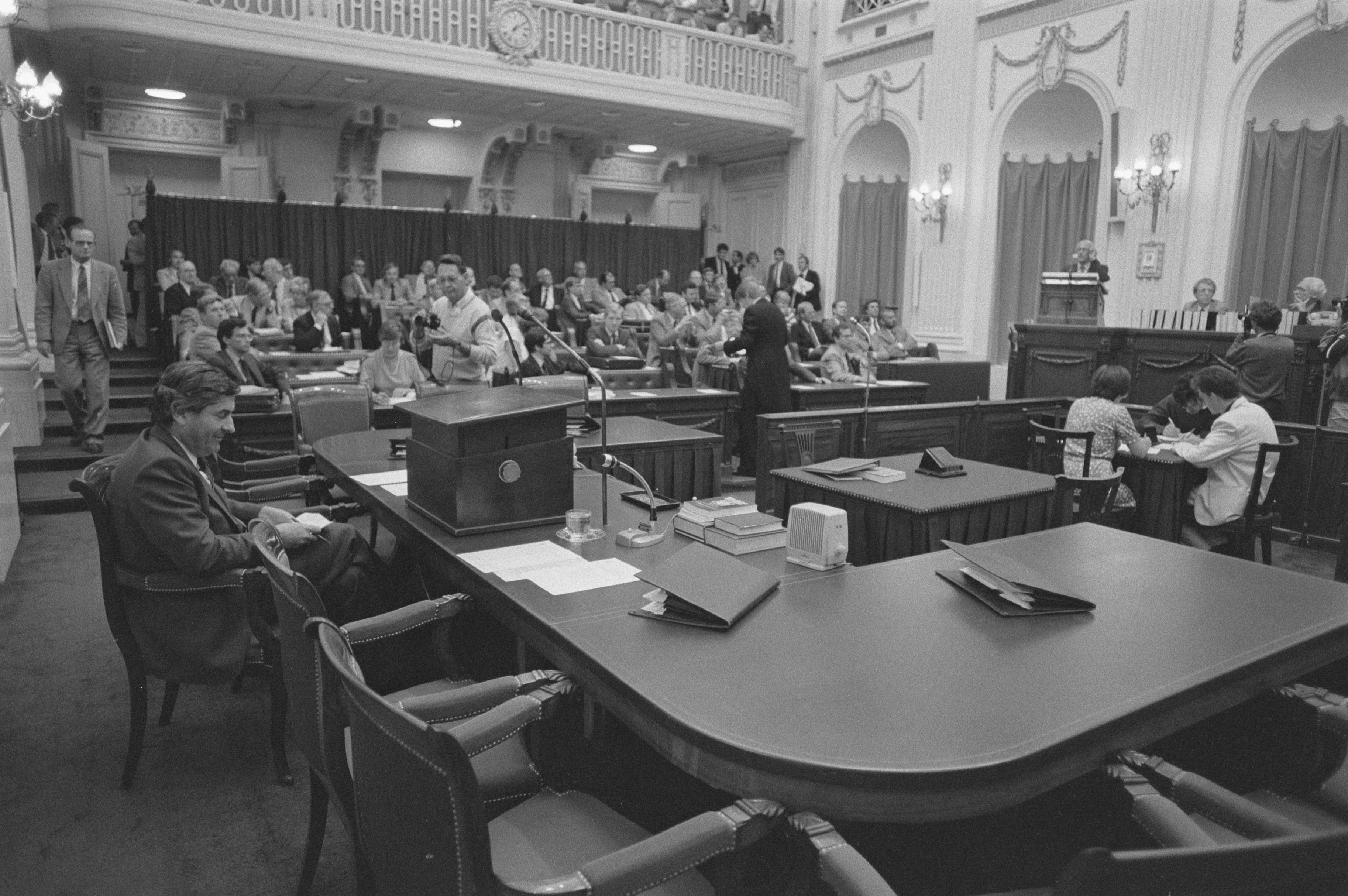 Collectie / Archief : Fotocollectie Anefo Reportage / Serie : [ onbekend ] Beschrijving : Tweede Kamer weer bijeen na zomerreces; premier Lubbers tijdens vragenuurtje (debat met Den Uyl ) Datum : 28 augustus 1984 Trefwoorden : Debatten Persoonsnaam : Lubbers, Ruud, Uyl, Joop den Fotograaf : Bogaerts, Rob / Anefo Auteursrechthebbende : Nationaal Archief Materiaalsoort : Negatief (zwart/wit) Nummer archiefinventaris : bekijk toegang 2.24.01.05 Bestanddeelnummer : 933-0590